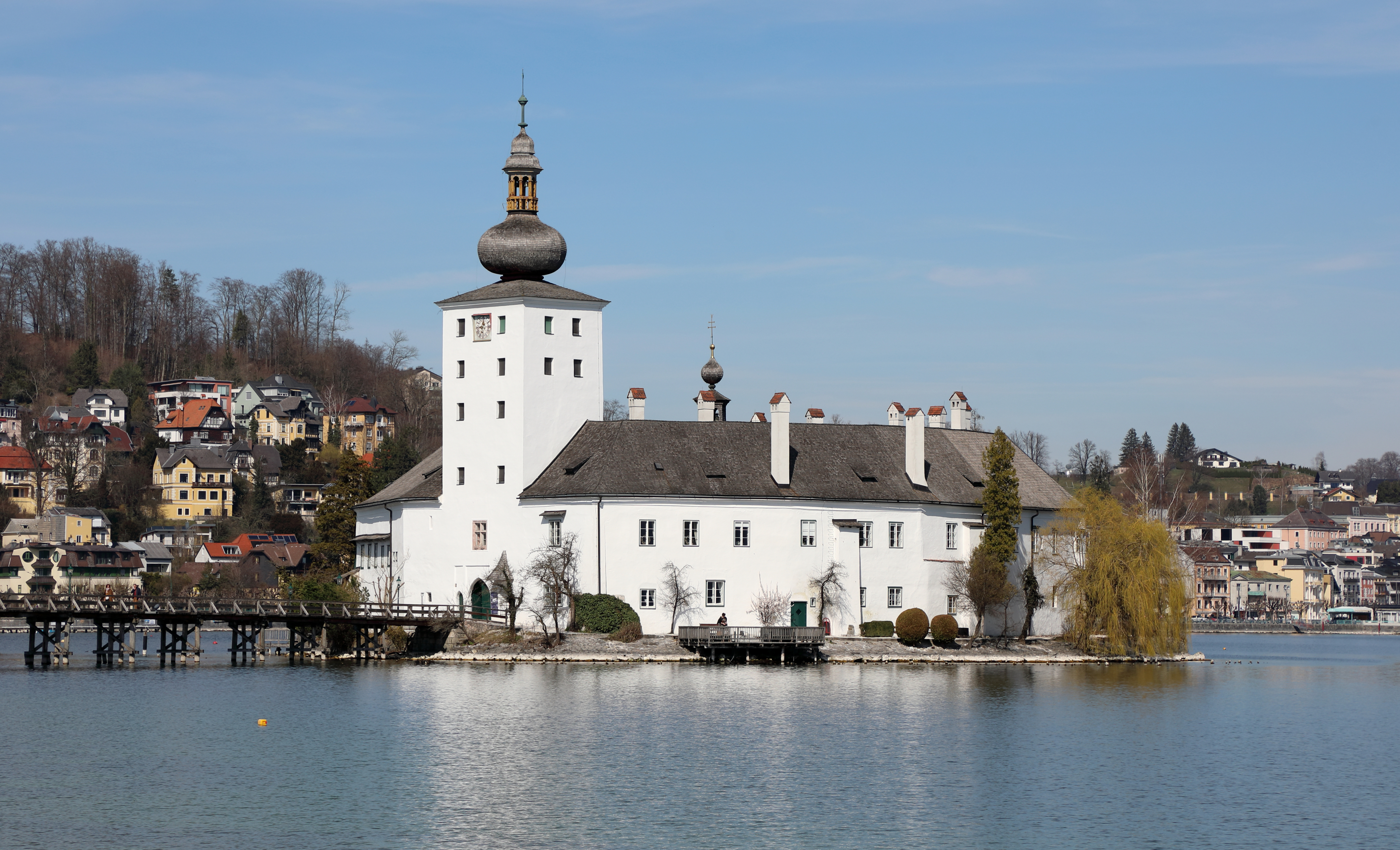 Südansicht des Schlosses Ort und im Hintergrund die oberösterreichische Stadtgemeinde Gmunden.Das Schloss befindet sich auf einer Insel im Traunsee und zählt zu den ältesten Gebäuden des Salzkammergutes. Ursprünglich war das Schloss eine Wasserburg, wurde jedoch nach dem Brand 1626 in der heutigen Form wiedererrichtet.